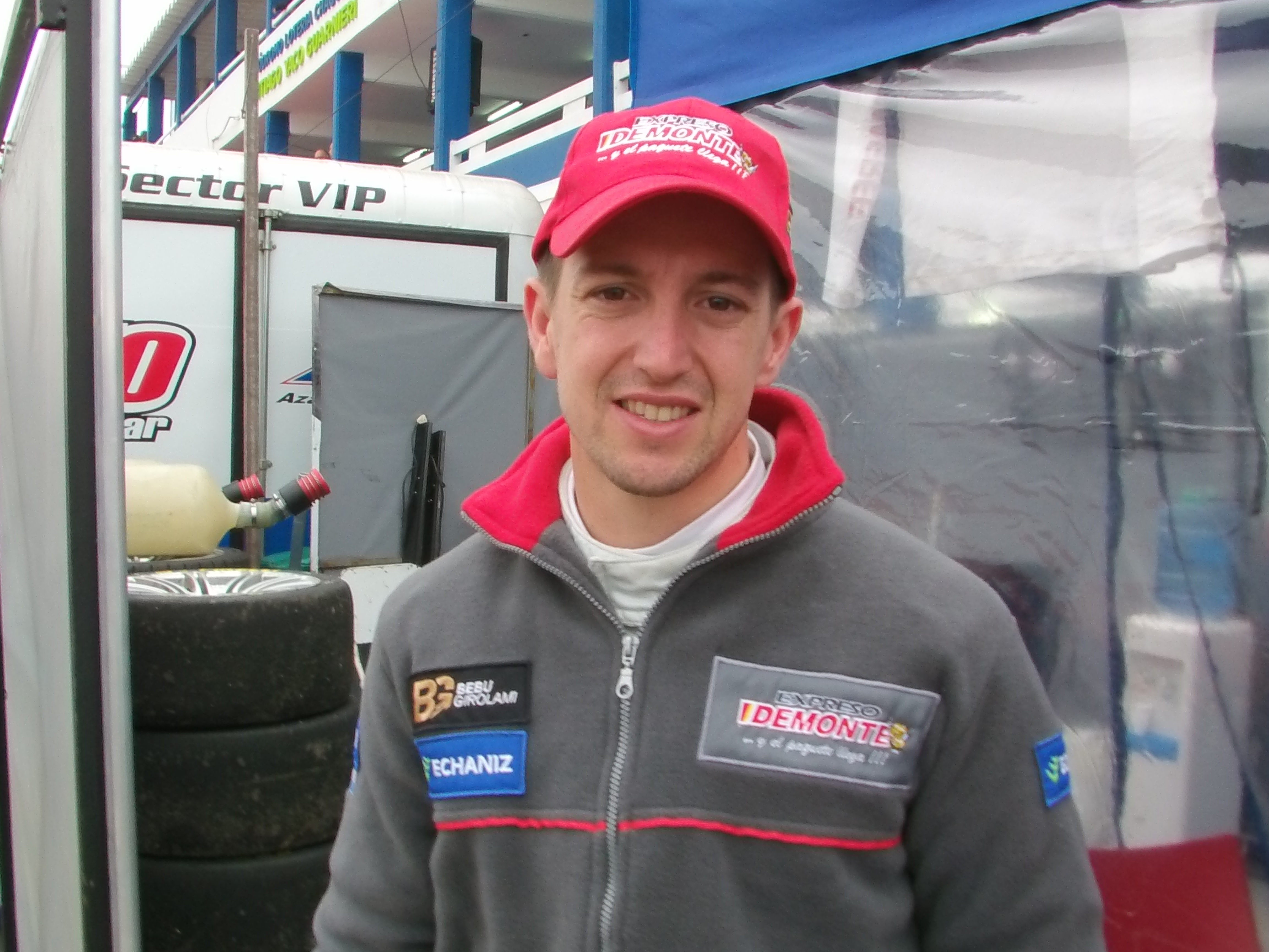 Néstor Adrián Girolami, piloto argentino de automovilismo de velocidad. Bicampeón argentino de la categoría Súper TC 2000, 2014-2015. Participante en categorías como el Turismo Carretera, Turismo Nacional, Top Race y Stock Car Brasil.